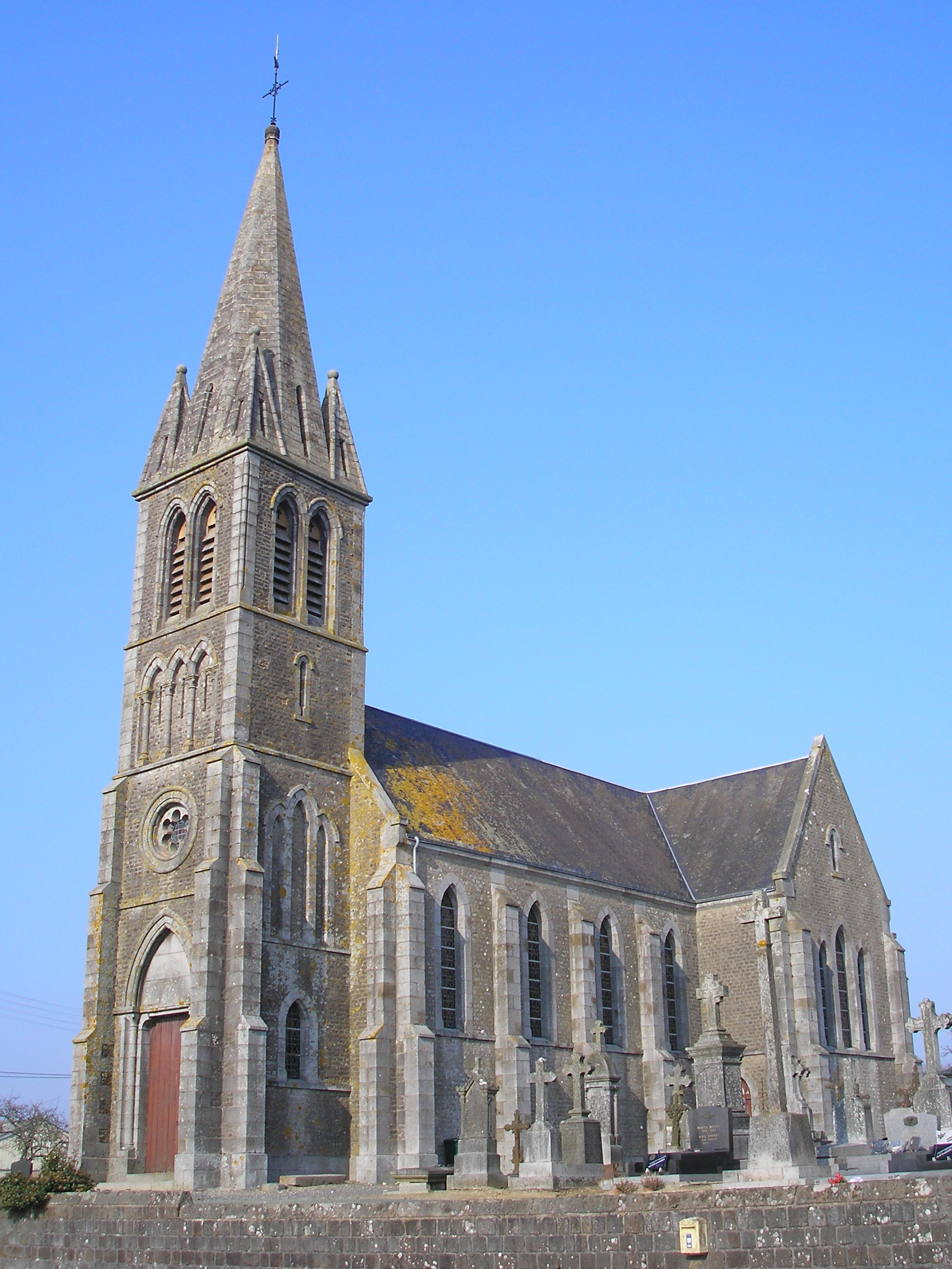 Truttemer-le-Petit (Normandie, France). L'église Saint-Martin.